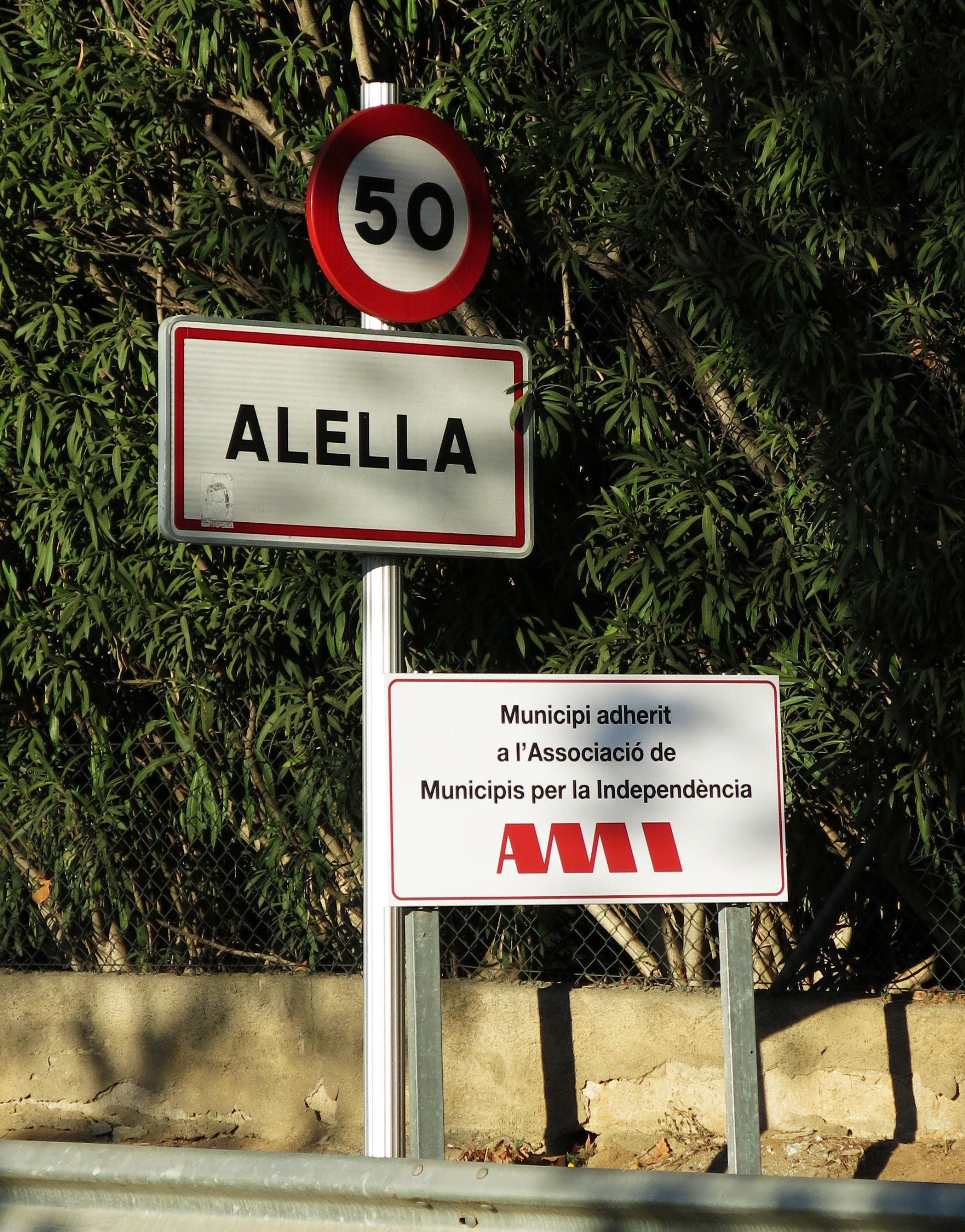 Rètols a l'entrada a Alella des del sud, a la carretera BP-5002